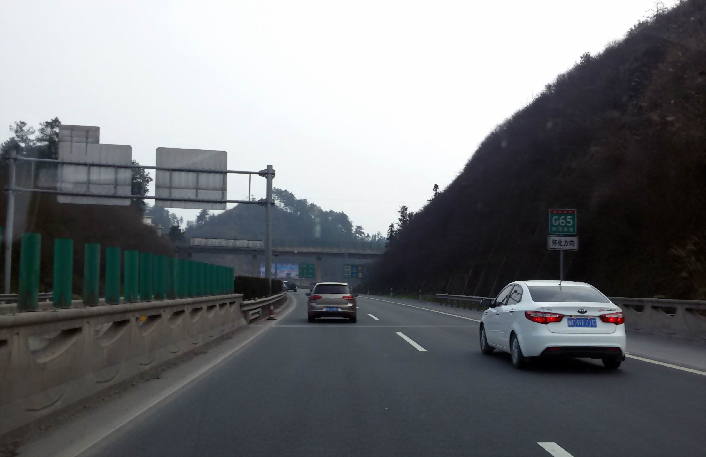 中国高速G65 近G56交汇处 怀化（茂名）方向